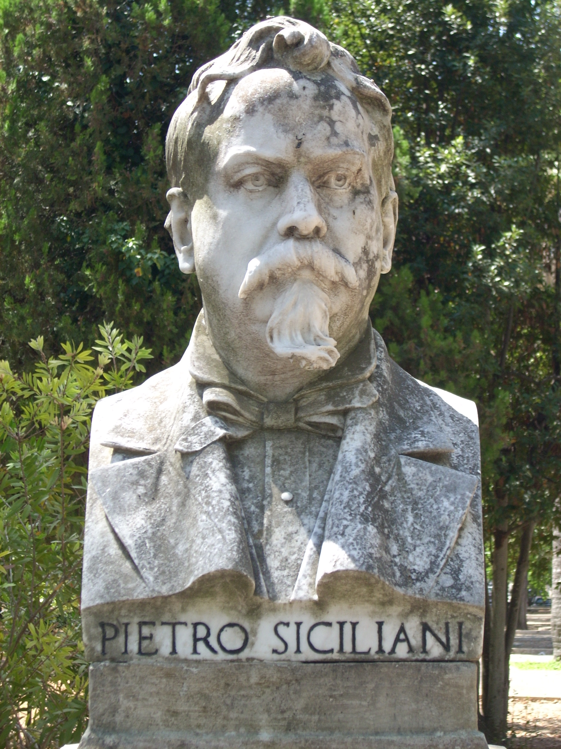 Busto di Pietro Siciliani